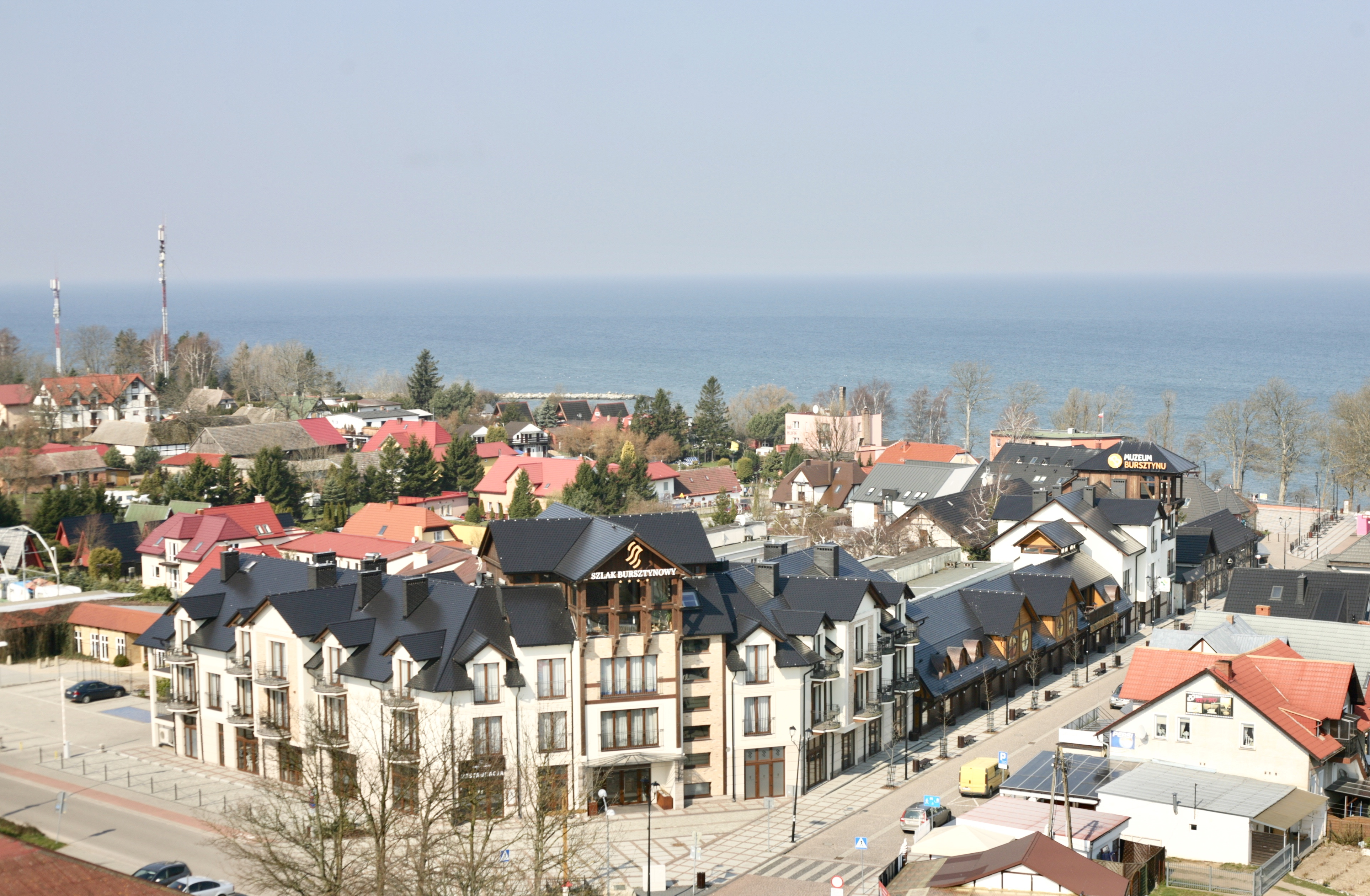 Centrum Jarosławca z latarni morskiej w 2018 r. Na zdjęciu promenada i hotel Szlak Bursztynowy.